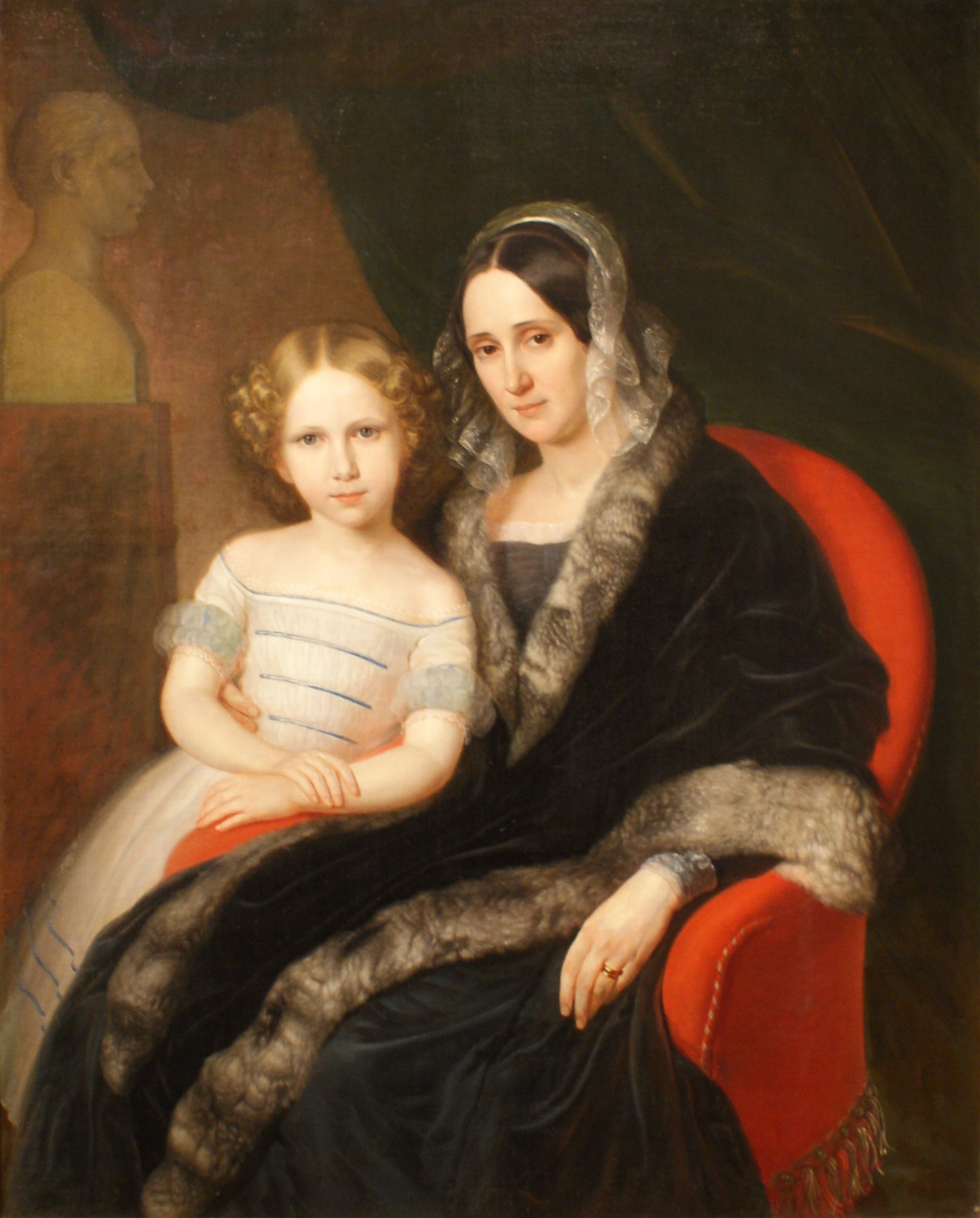 Партрэт М. М. (Марыі) Дандуковай-Корсакавай з дачкой